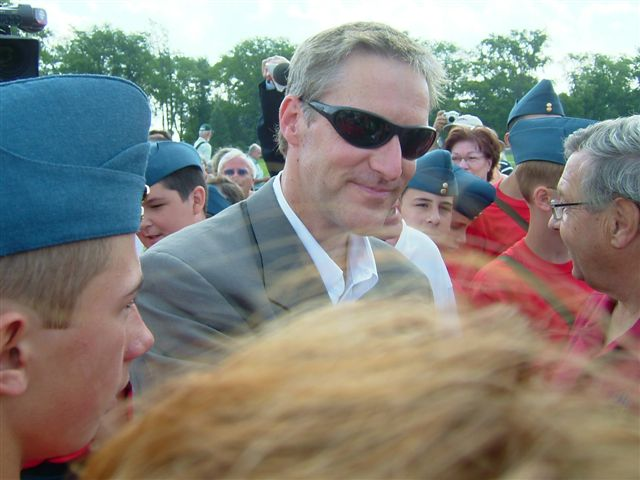 Erik Lindbergh vient à Québec quatre-vingts ans après son grand-père Charles Lindbergh. Il rencontre des cadets de l'air.